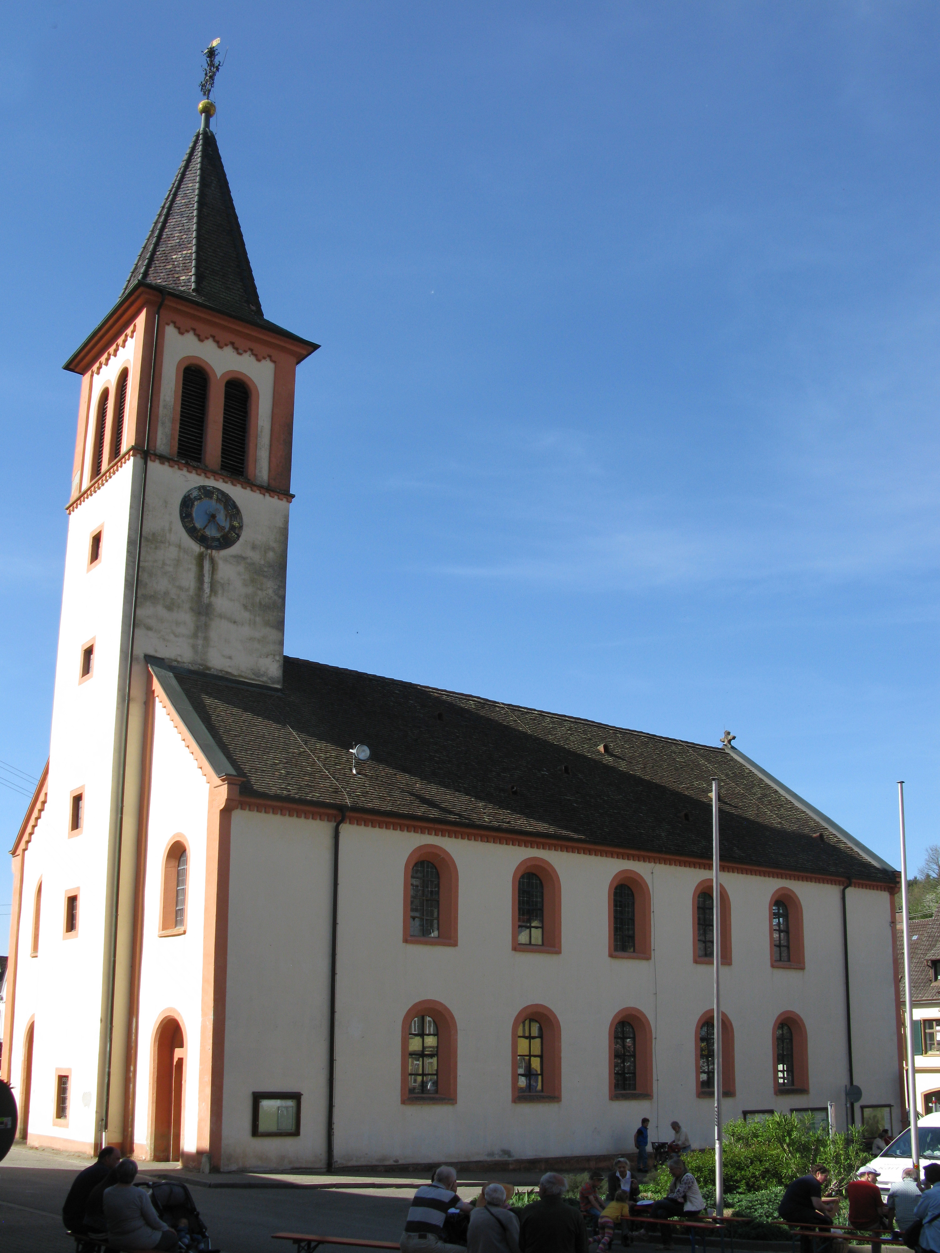 In der ehemaligen evangelischen Stadtkirche von Sulzburg befindet sich heute das Landesbergbaumuseum Baden-Württemberg.